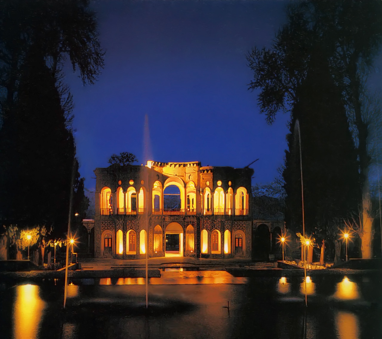 Shazdeh Garden, Mahan, Kerman, Iran